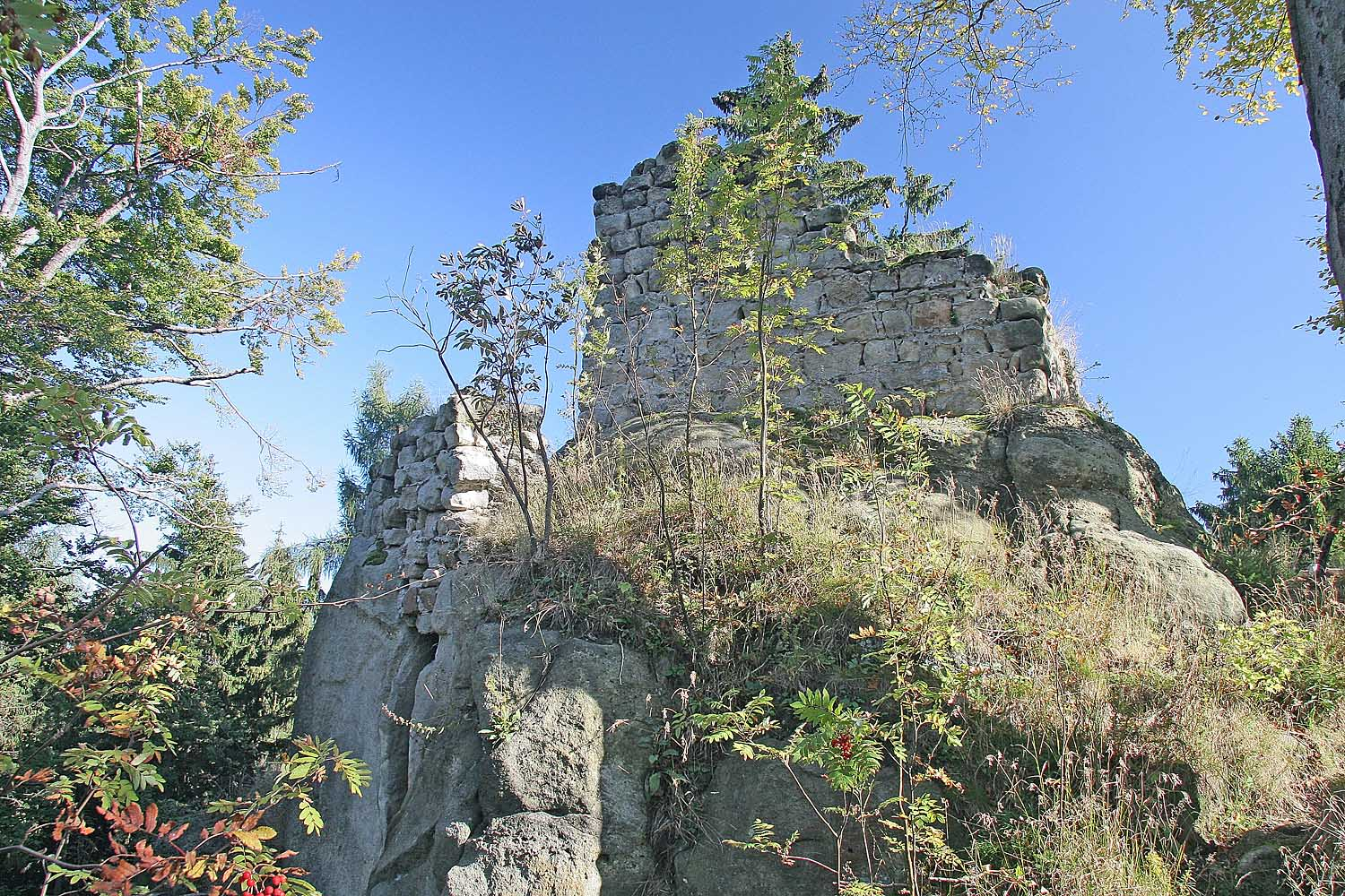 Ruine der Burg Karlsfried near Town Zittau in Sachsen, Germany autor: Prazak date: 22. 9. 2006